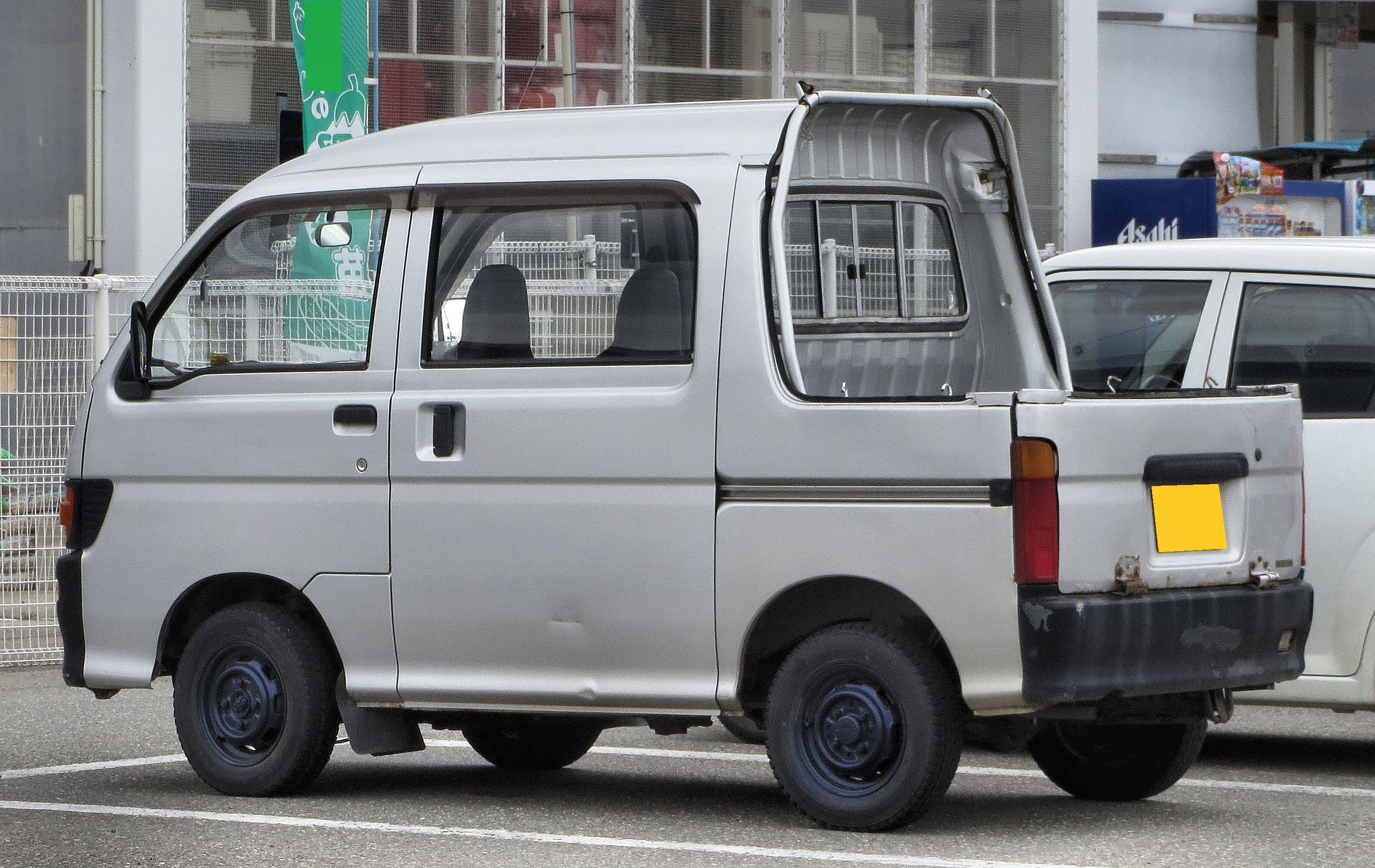 ダイハツ ハイゼットデッキバン 4WD S110